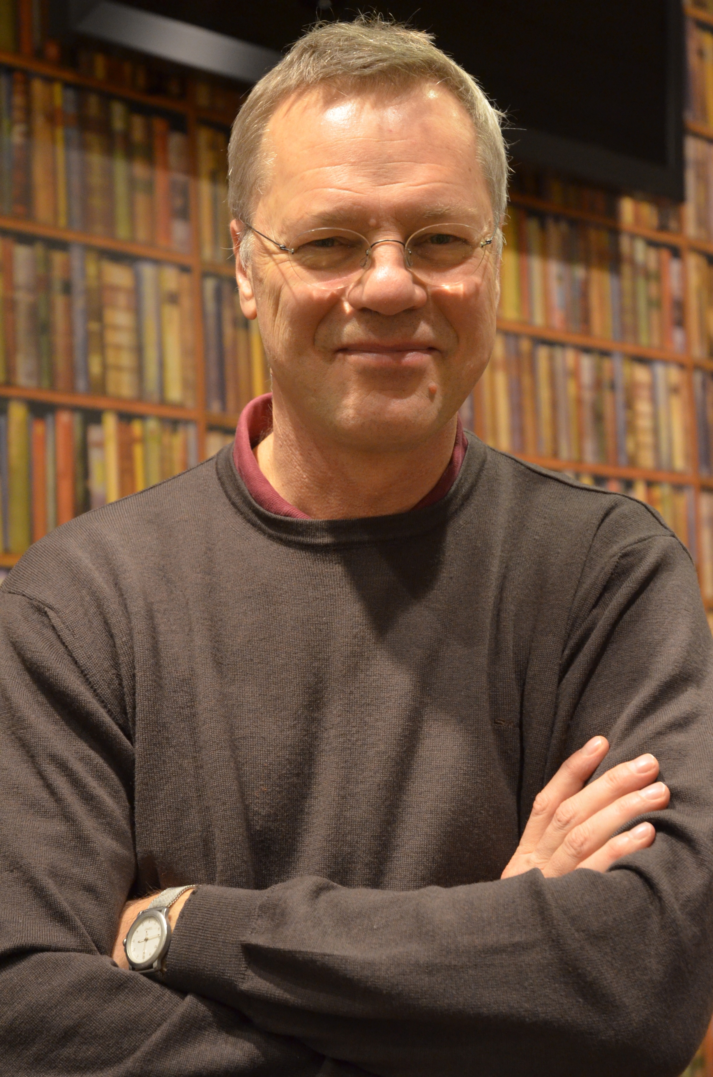 Svante Weyler på Akademibokhandeln City/Stockholm 21 april 2012.